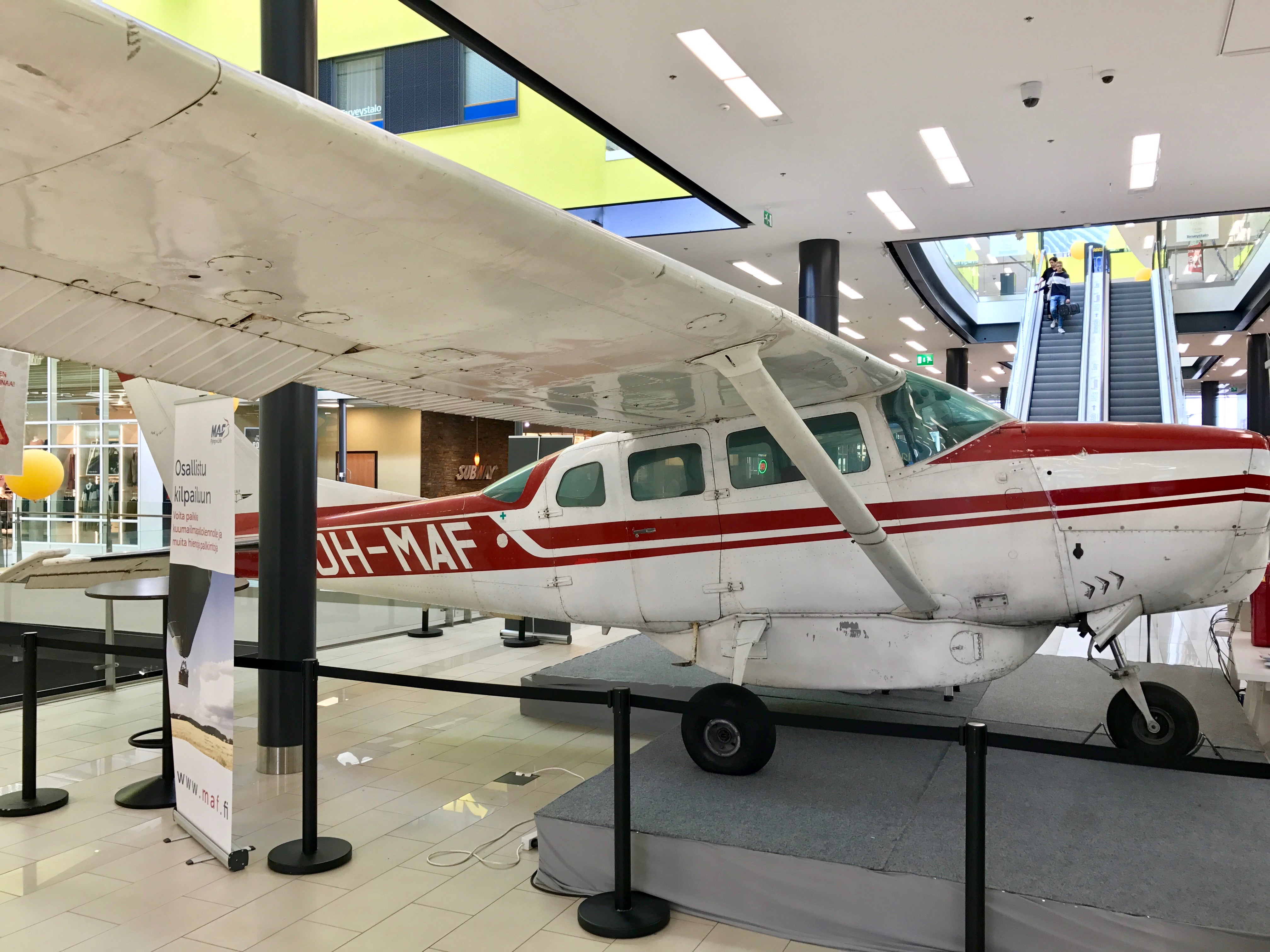 Vuonna 1966 valmistettu Cessna 206-lentokone. Kone palveli 20 vuotta MAF-lento-operaatioissa Afrikassa. Sen jälkeen lentokone on palvellut lähetyslentäjien koulutuksessa viimeiset 20 vuotta.